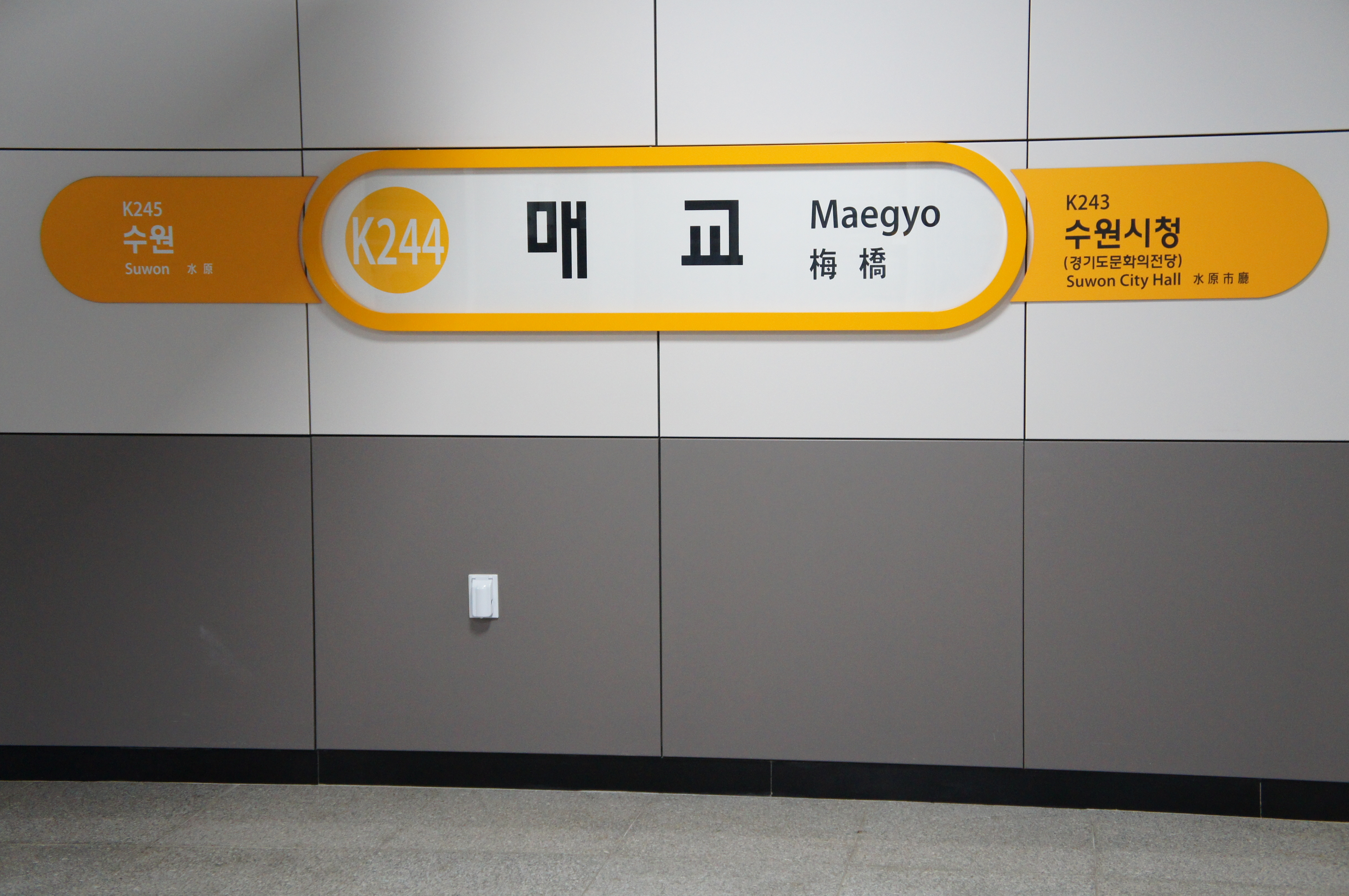 매교역 역명판